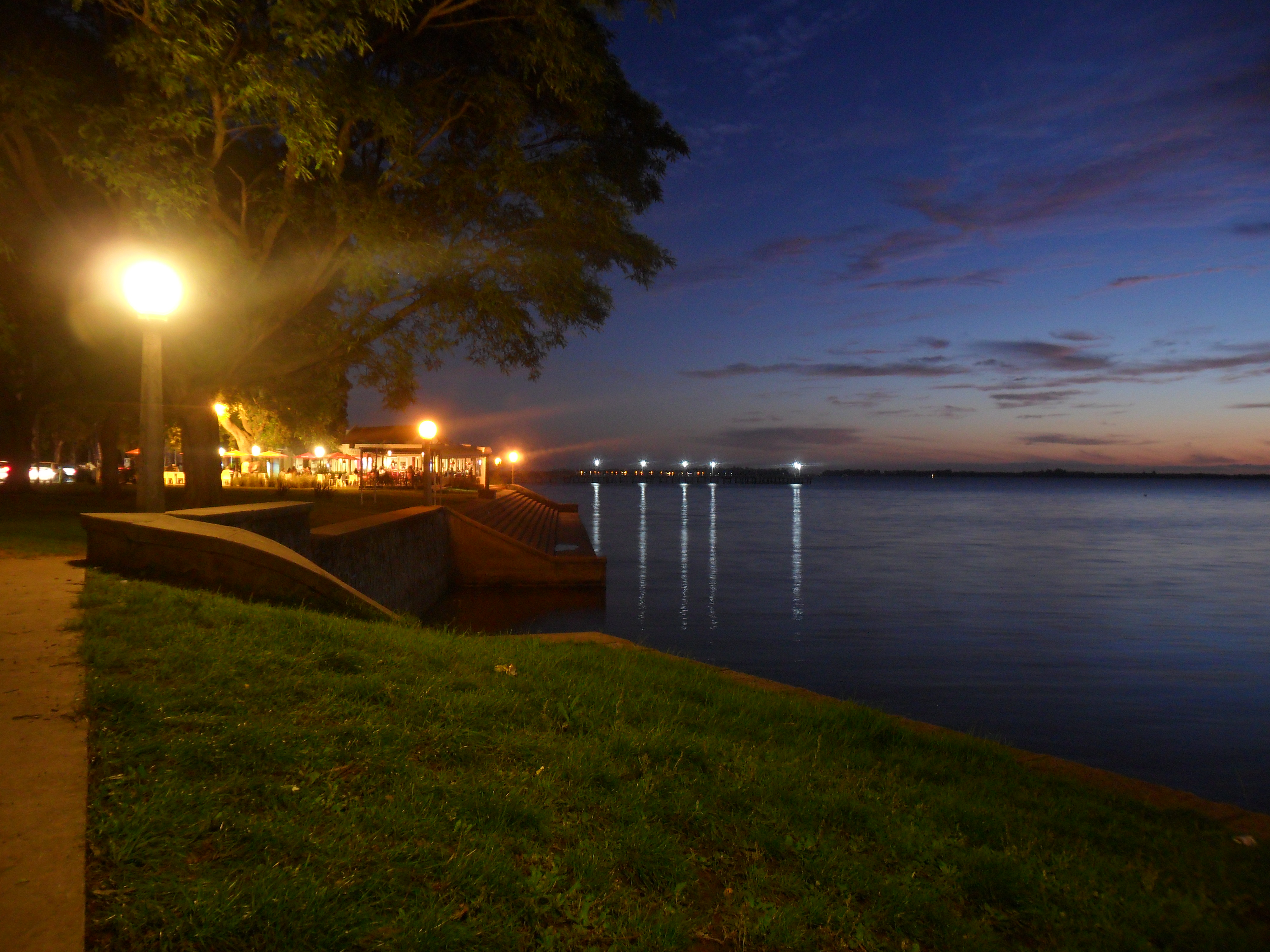 Laguna de Chascomús